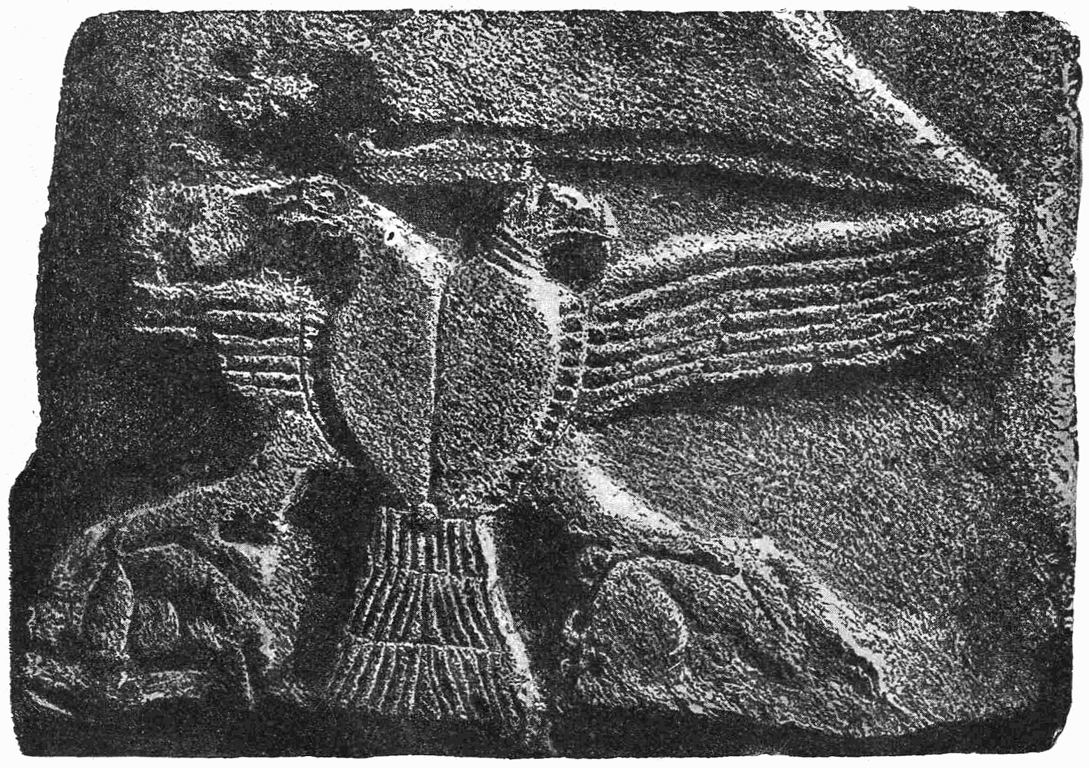 l’aigle bicéphale, bas-relief hetéen d’euyuk